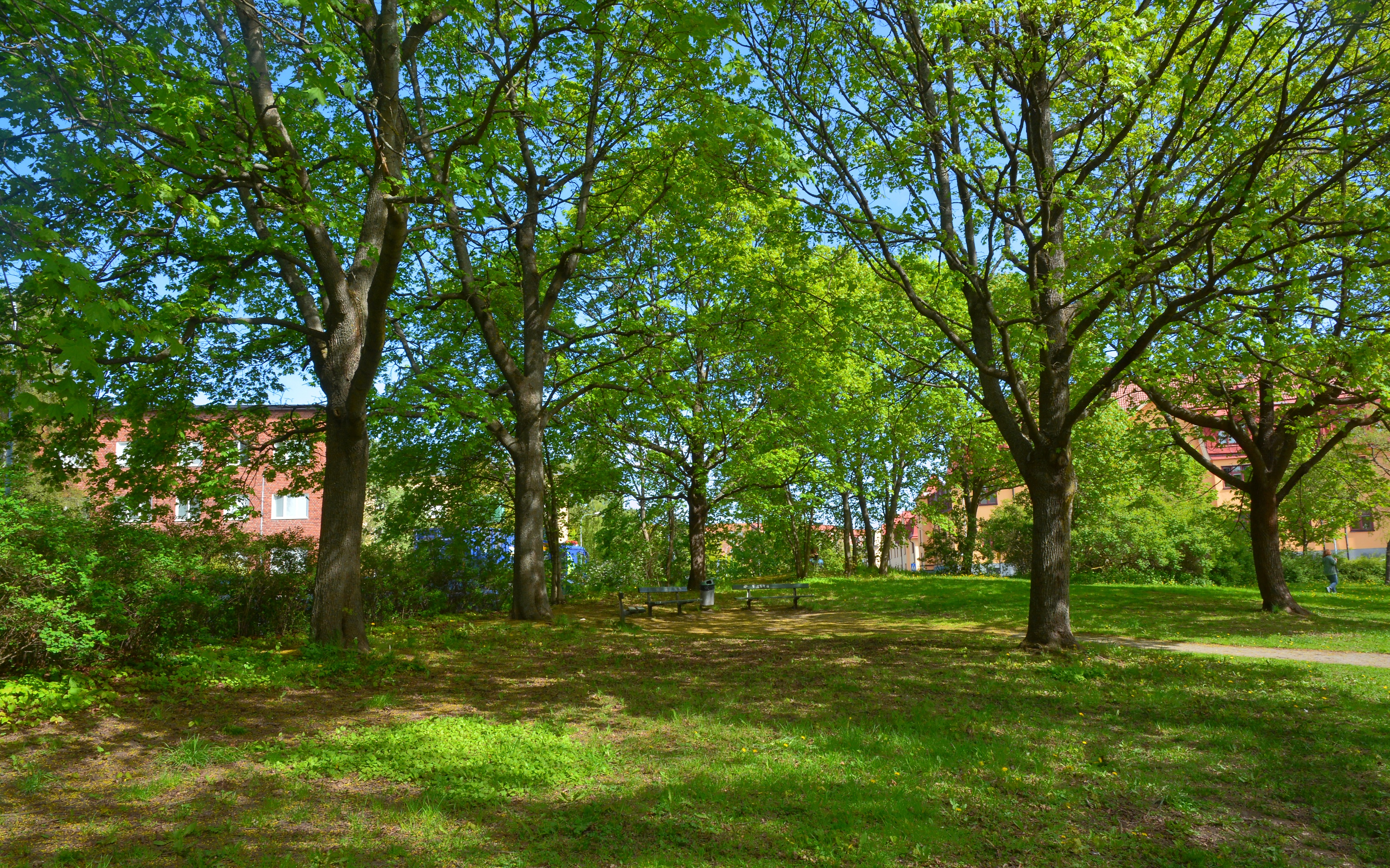 Svanhagen i Midsommarkransen i södra Stockholm.